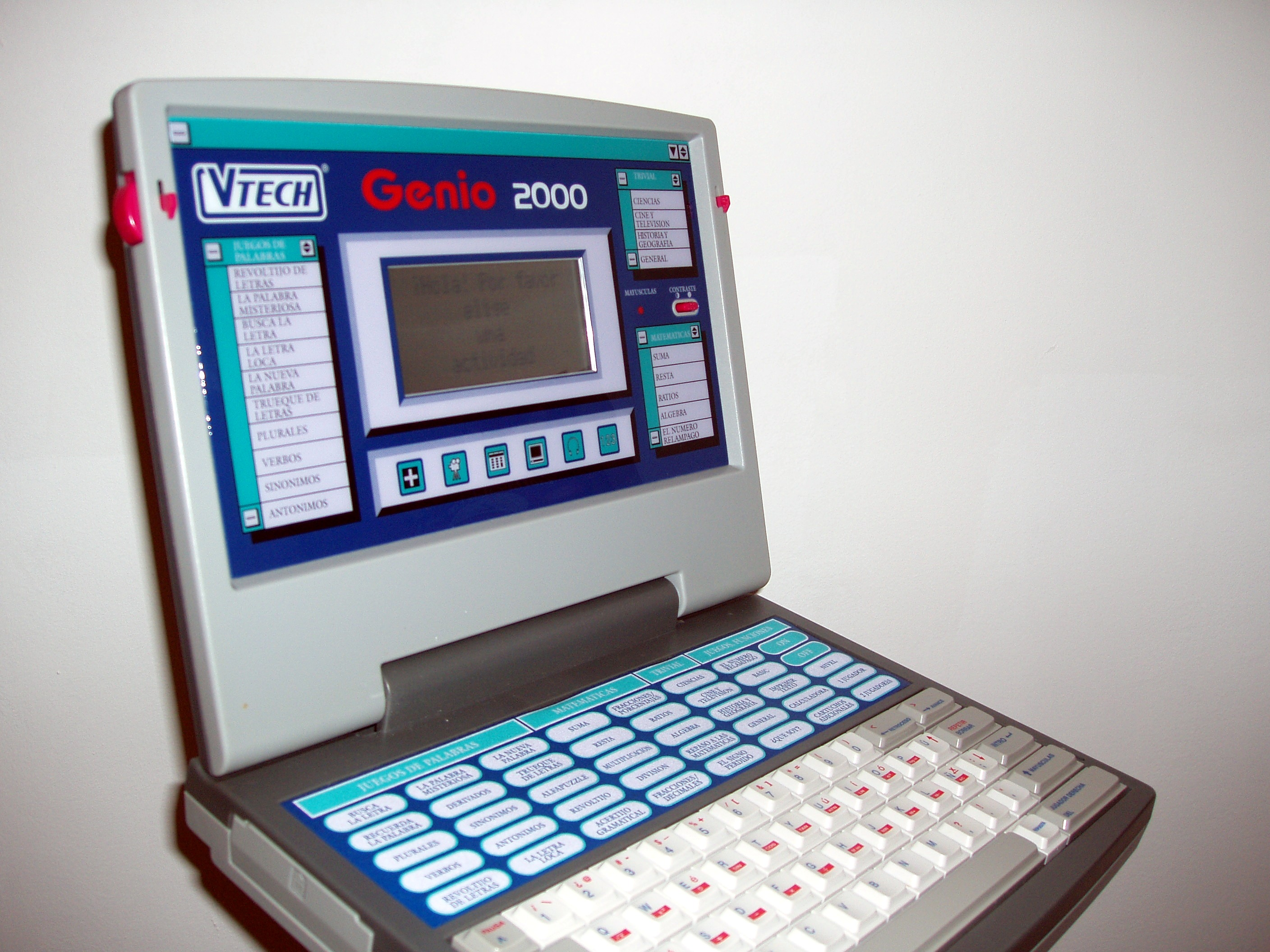 Ordenador de juguete Genio 2000.